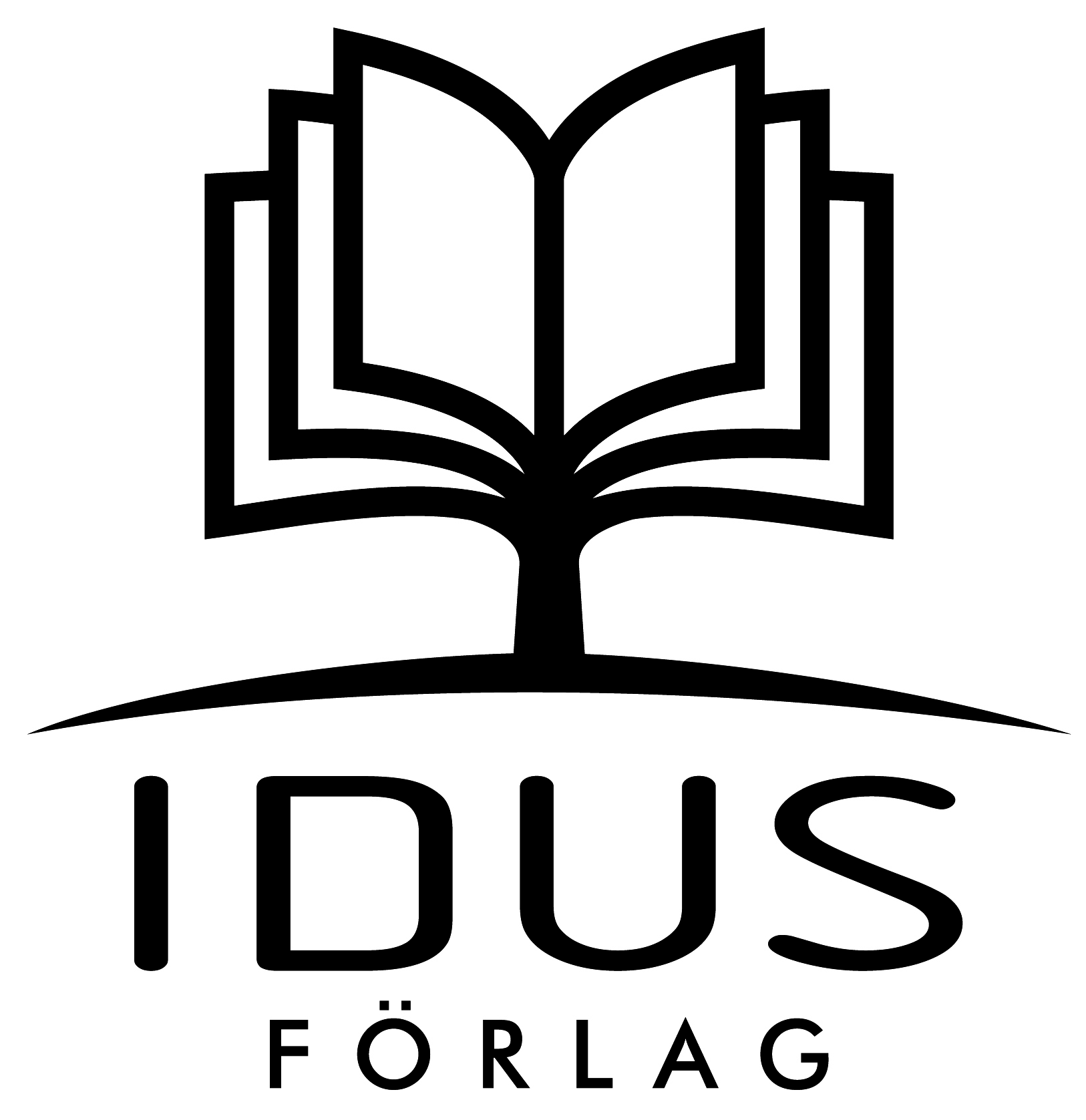 Logotyp för Idus förlag.